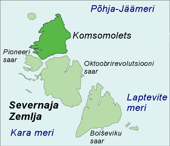 Komsomoletsi saare asukoht